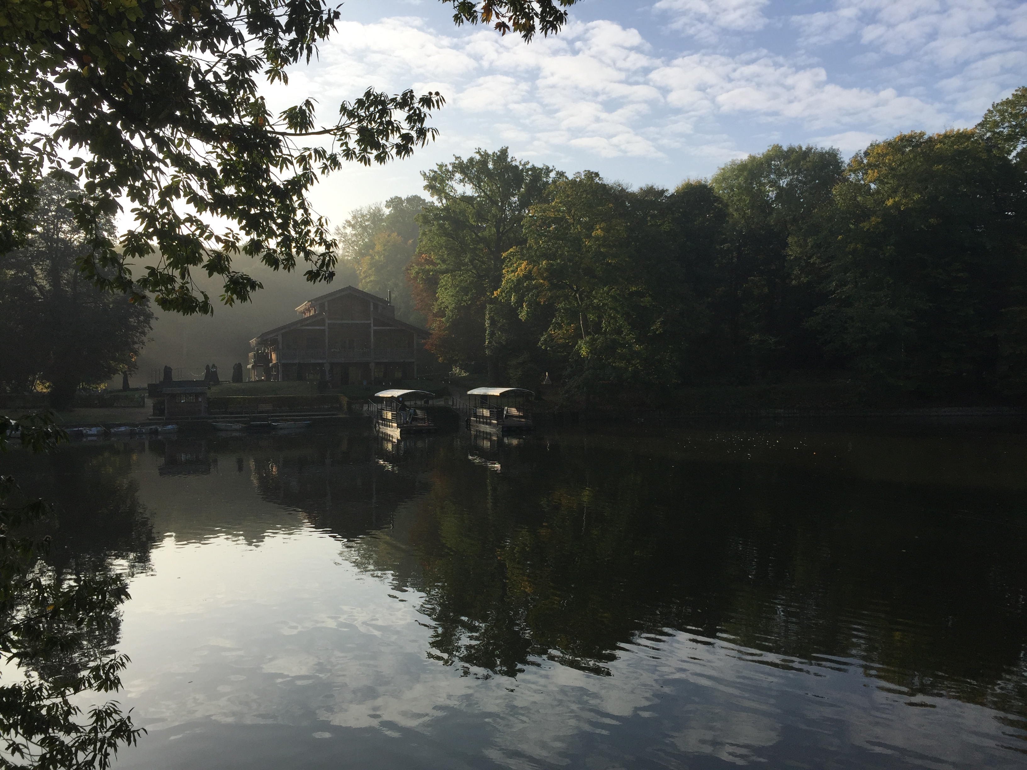 Le Chalet Robinson, un matin d'automne